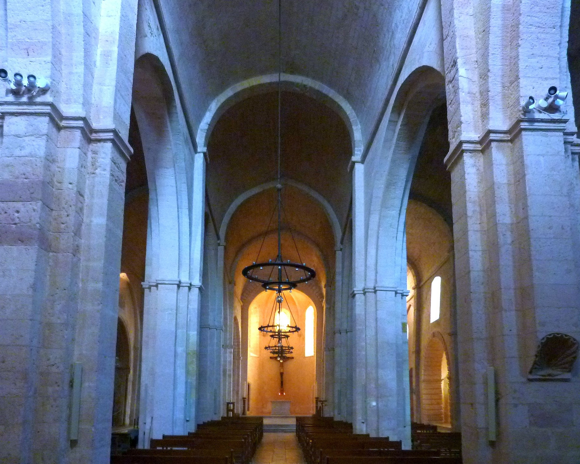 Eglise Saint-Laurent (Marseille)